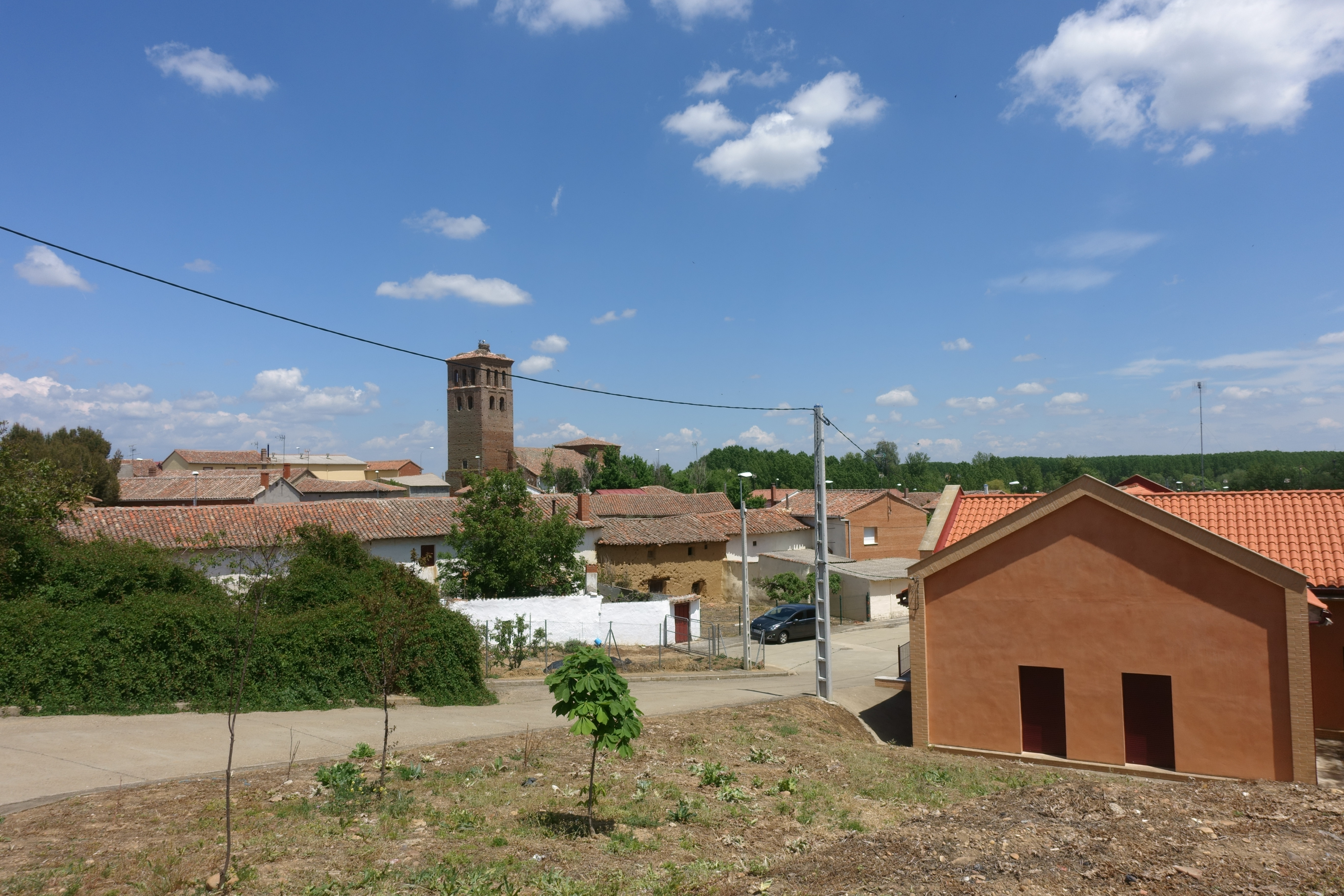 Vista general de Villamol (León, España).